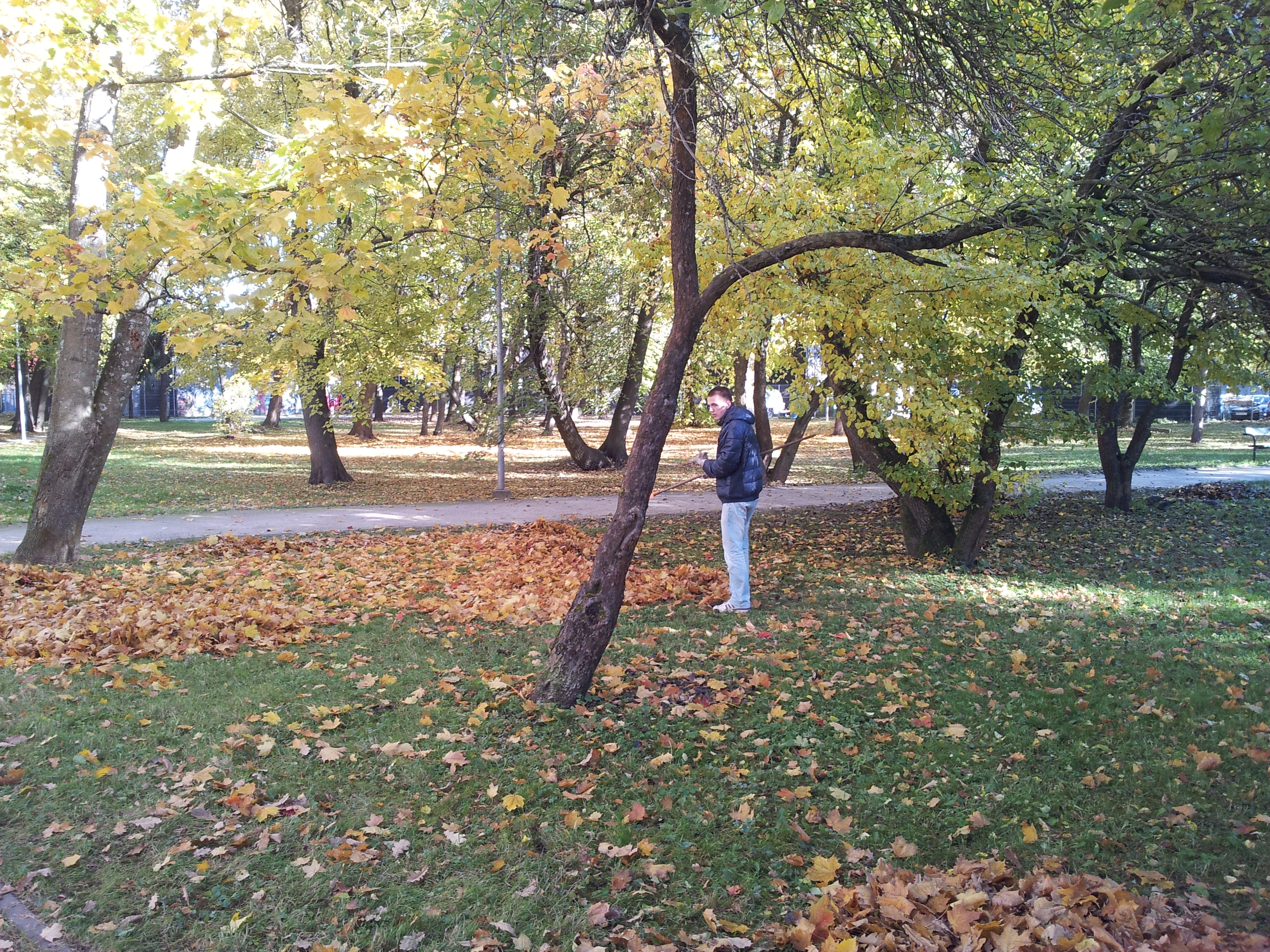 Kristiine LOV heakorratööline